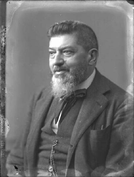 Filippo Turati